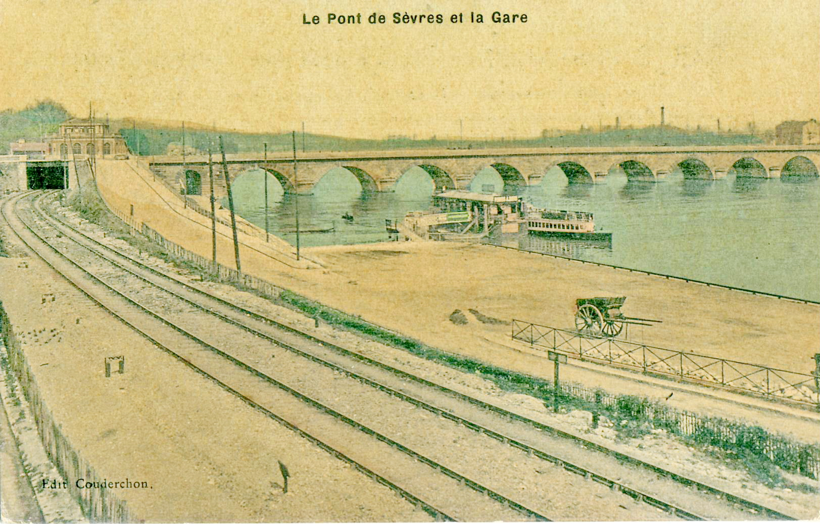 Carte postale ancienne éditée par Couderchon Le Pont de Sèvres et la Gare La carte montre au premier plan les voies de la ligne des Moulineaux avant sa transformation en ligne T2 du tramway d'Île-de-France, ainsi qu'une navette fluviale